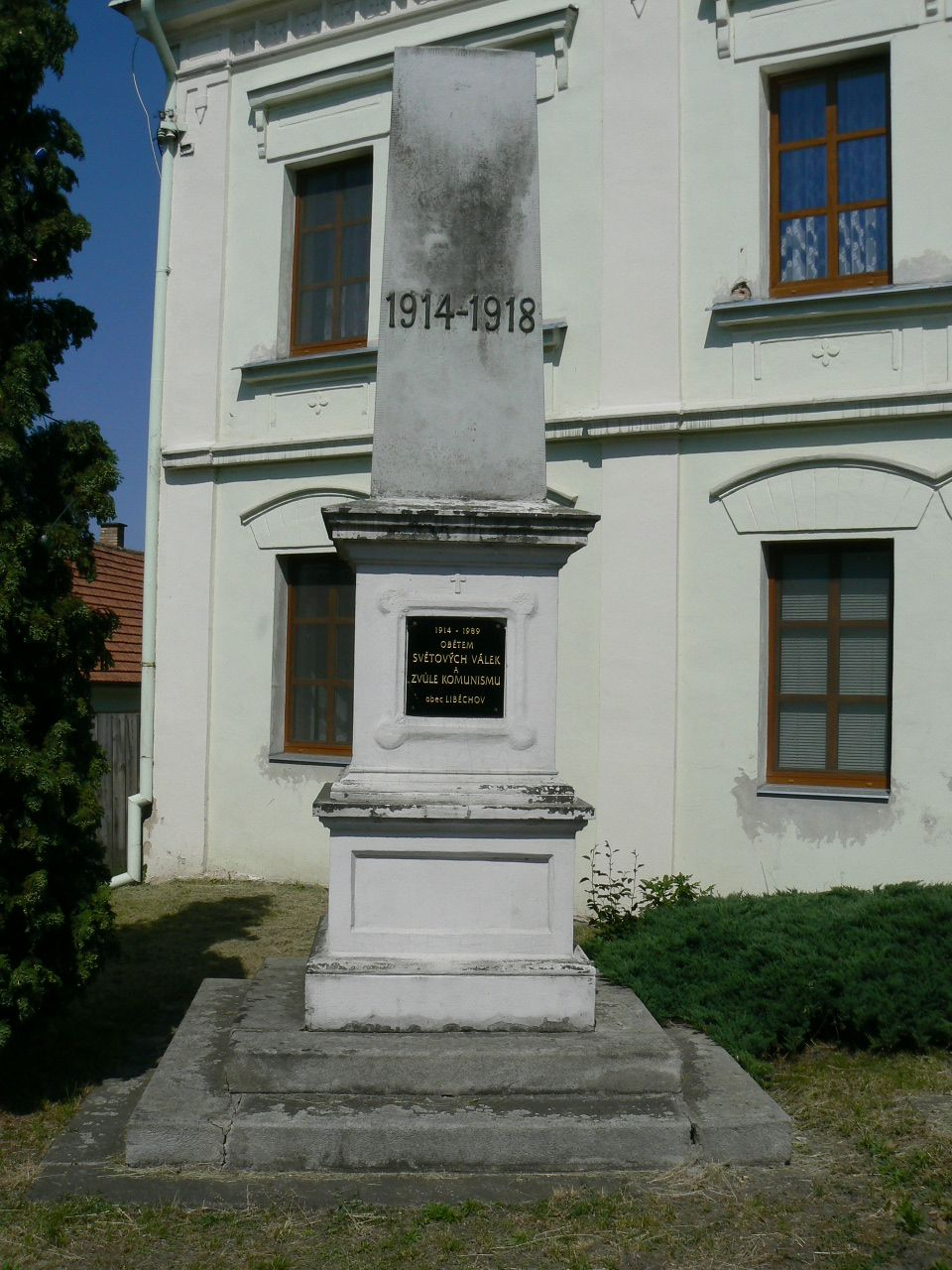 Pomník obětem obou světových válek a komunismu v Liběchově, okres Mělník